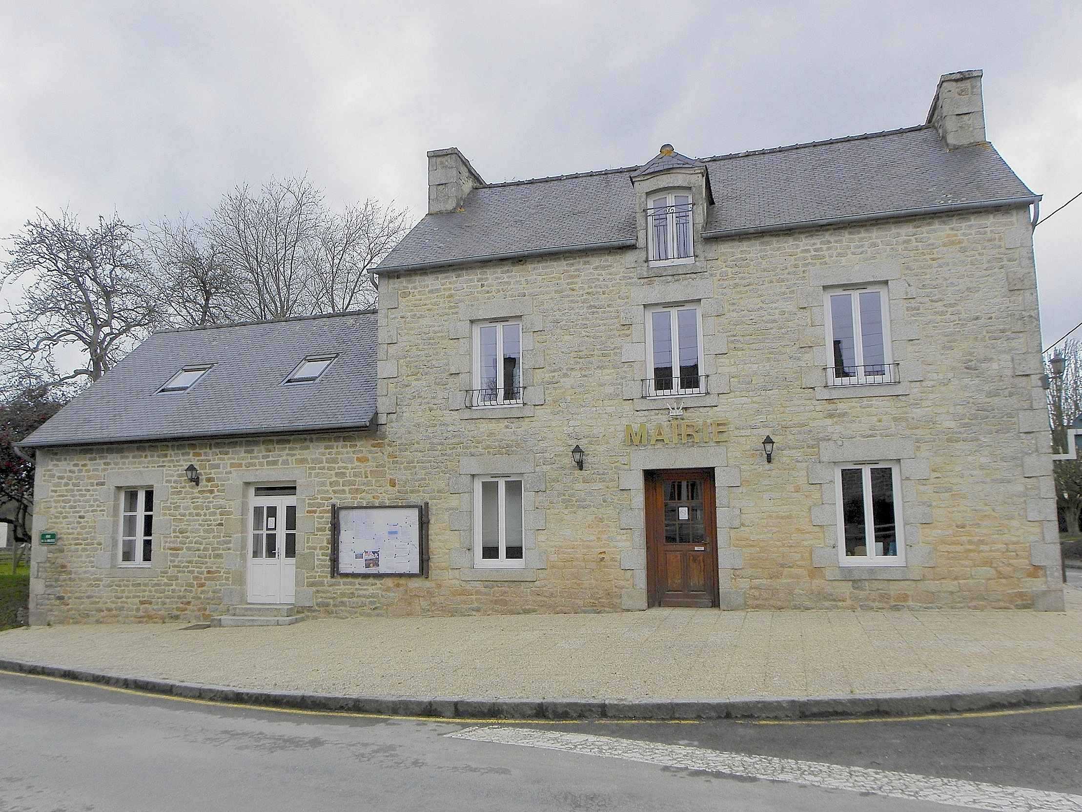 Nouvelle mairie d'Aucaleuc (22).